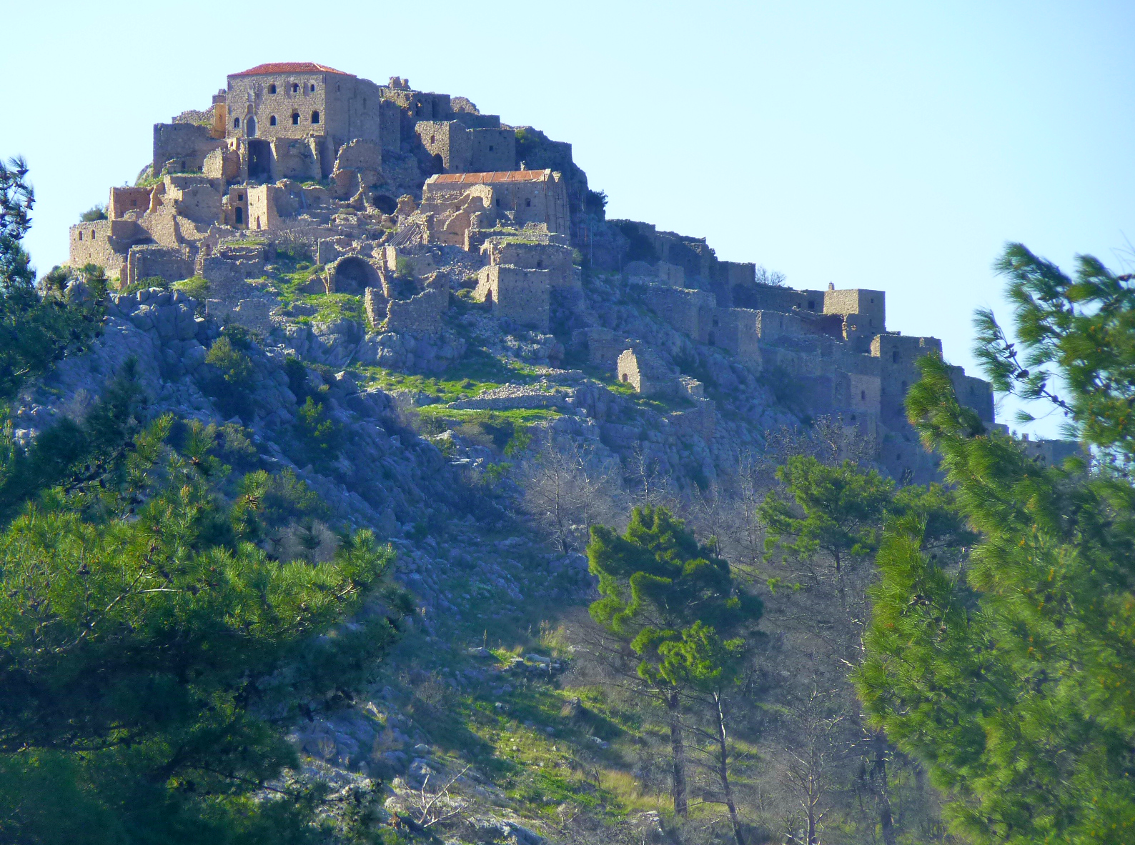 Ανάβατος